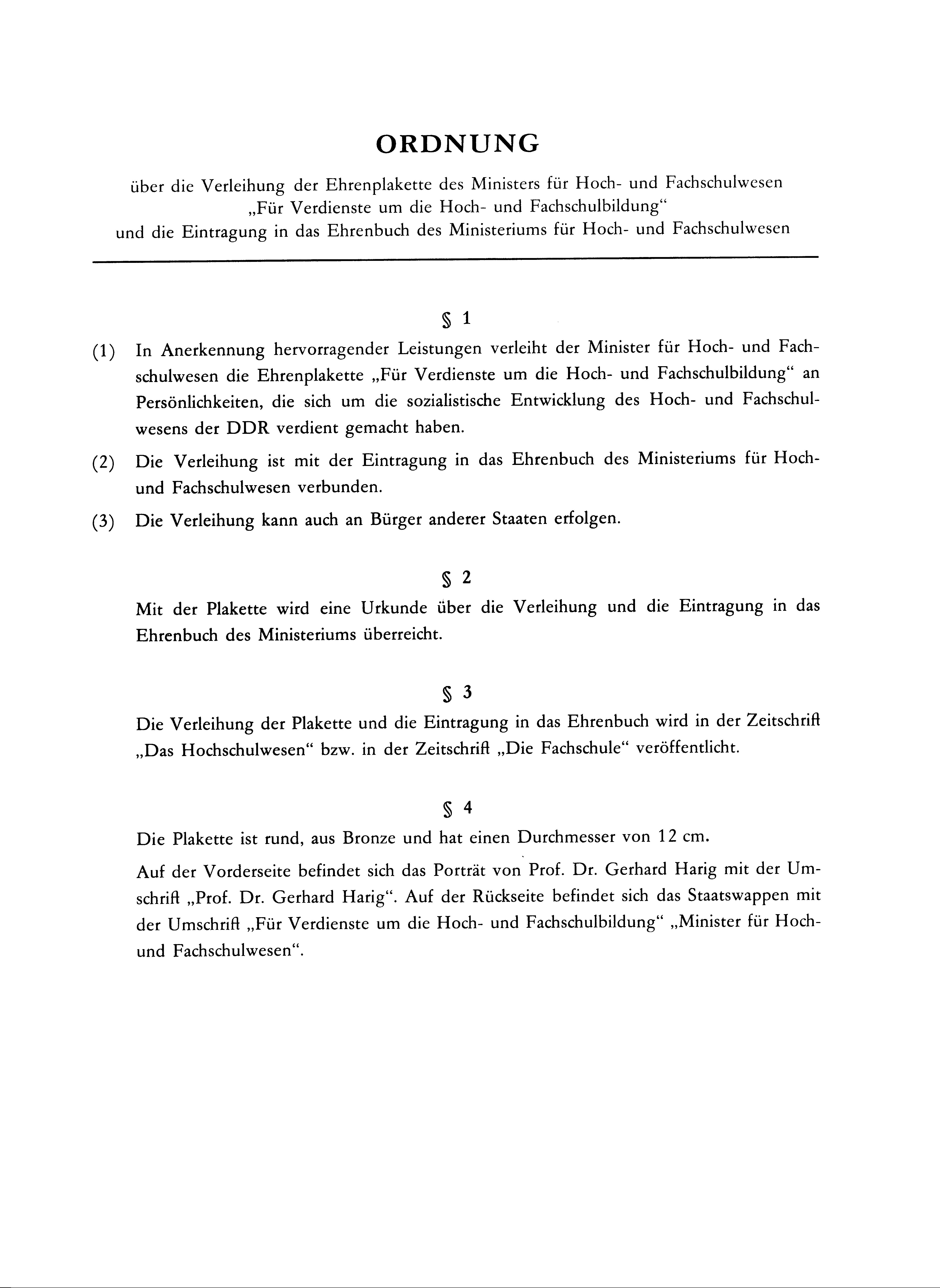 Ordnung_der_Verleihungsurkunde_Ehrenplakette des Ministers für Hoch- und Fachschulwesen der DDR für „Verdienste um die Hoch- und Fachschulfortbildung“